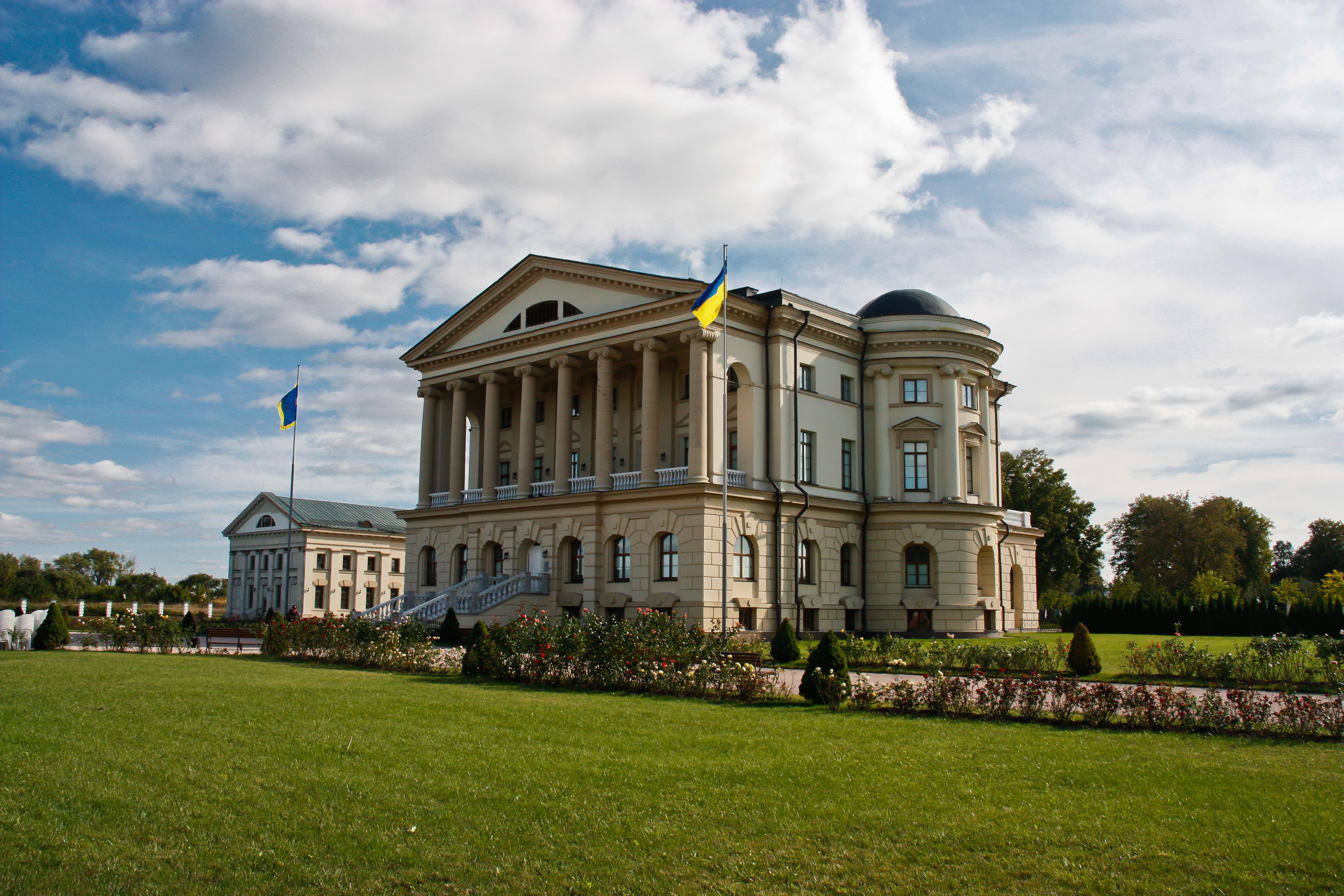 Палац К.Розумовського (мур.), Батурин, вул.Набережна, 1